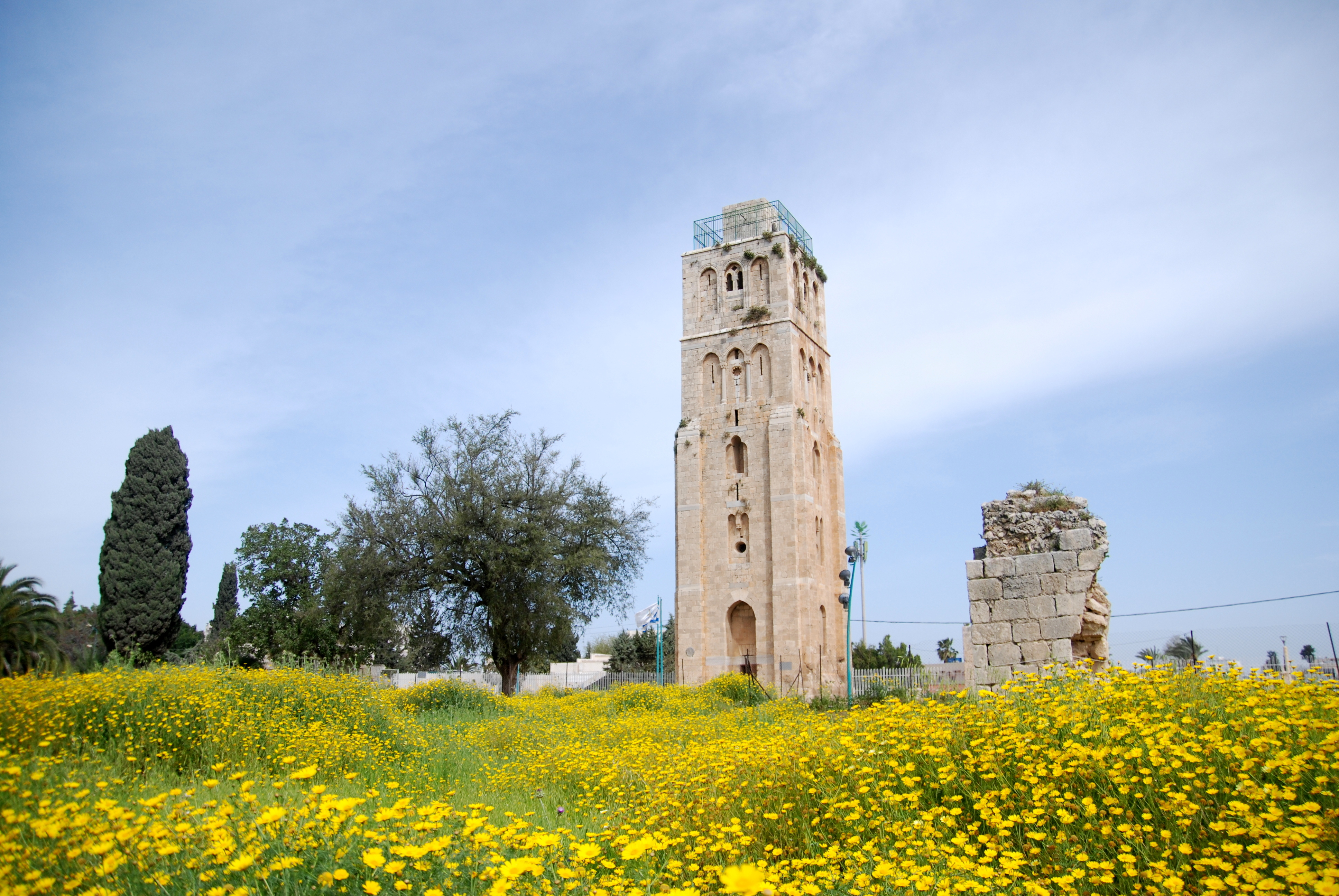 המסגד הלבן ברמלה הוא מבנה אסלאמי קדום, ששורשיו נעוצים בראשית המאה ה-8, בתקופת שלטונם של ח'ליפי בית אומיה. המסגד עבר מספר שינויים במהלך השנים, והבולט שבהם הוא הקמת המינרט הידוע בשם "המגדל הלבן" שנוסף לו בתקופה הממלוכית.